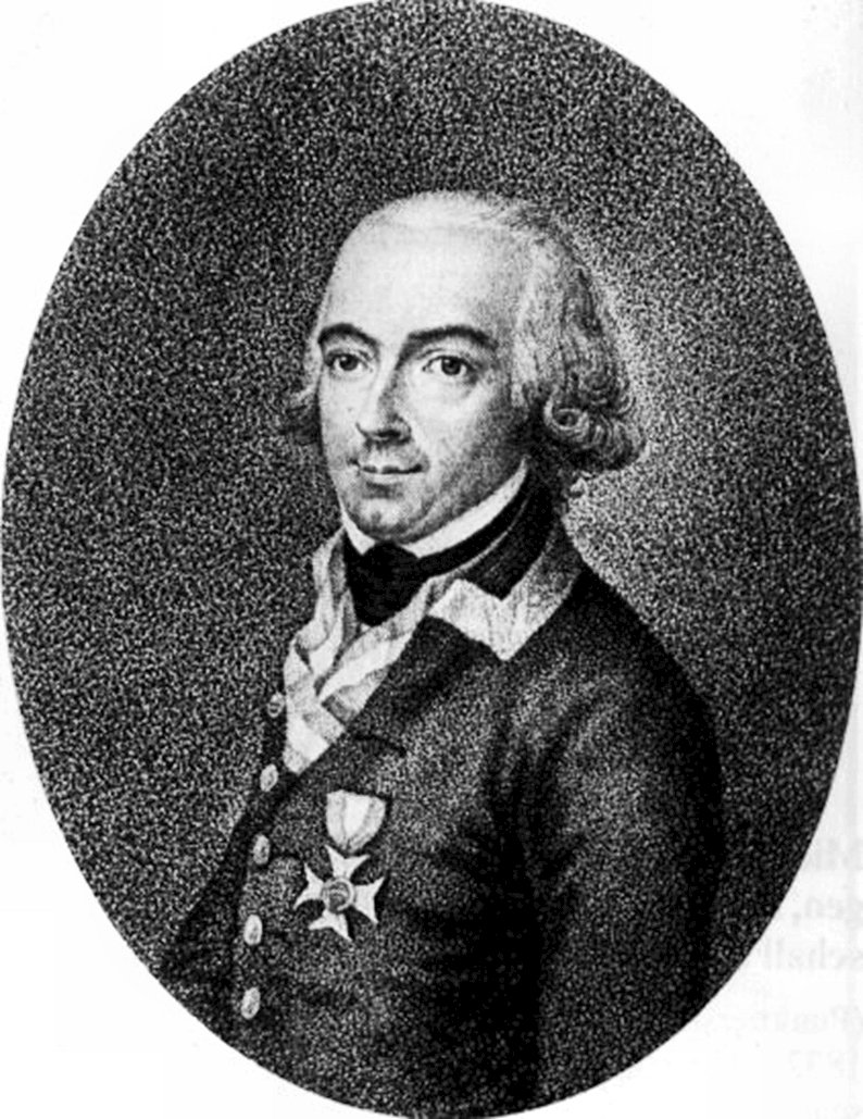 Der österreichische General Johann Gabriel von Chasteler (1763-1825)